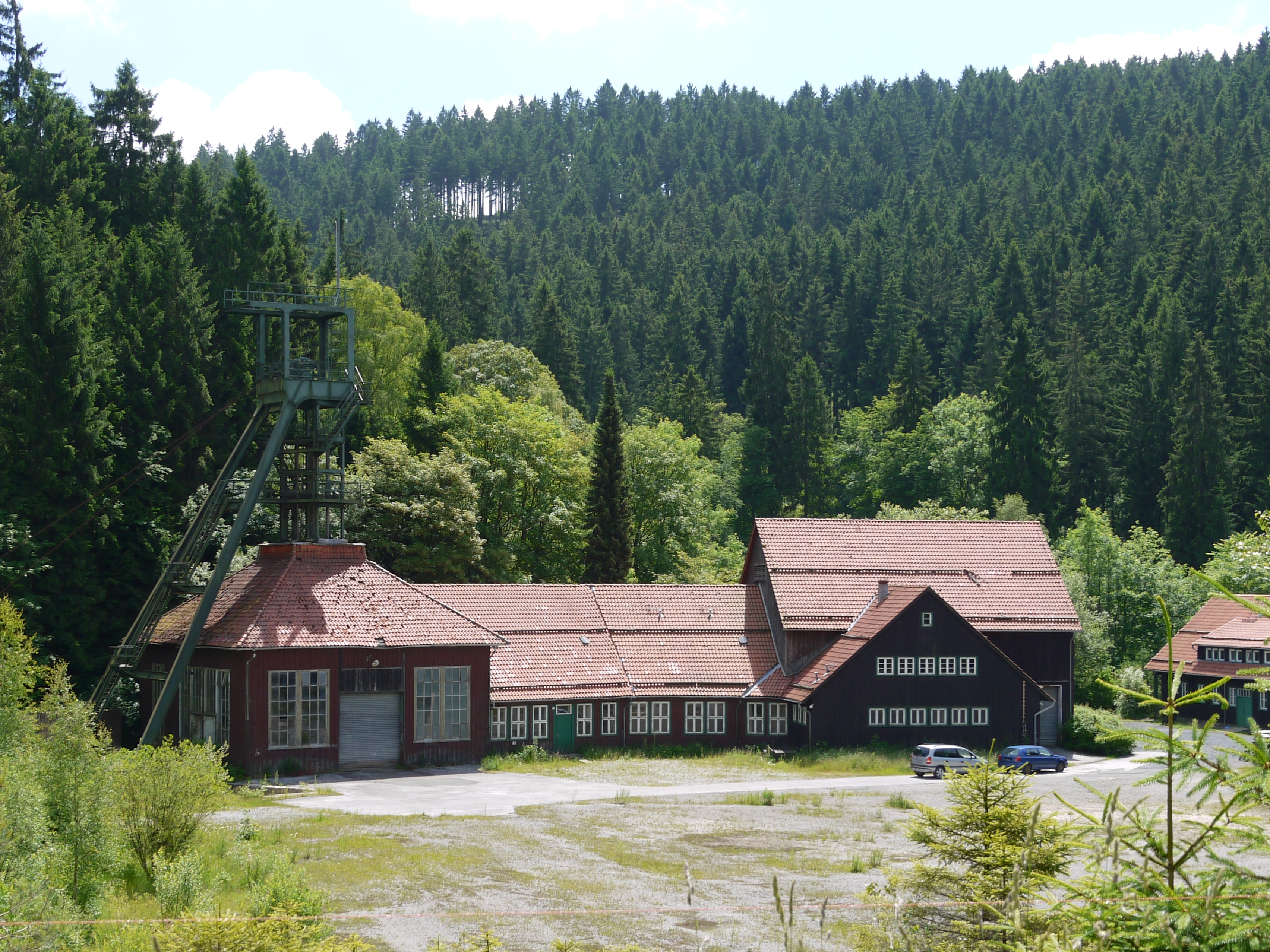 Erzbergwerk Grund - Schachtanlage Wiemannsbucht (Aufnahme 2014)